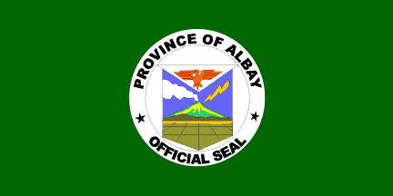 Dit materiaal is afkomstig van of en is door de auteur Jaume Ollé als GFDL beschikbaar gesteld, zie de toestemmingsemail. Hiermee vervallen de strictere voorwaarden in de disclaimers op de genoemde sites.